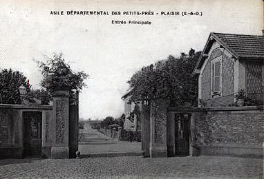 Plaisir (Yvelines-France) : entrée de l'asile